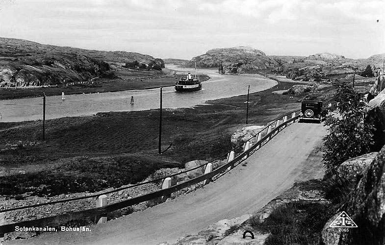 Sotenkanalen